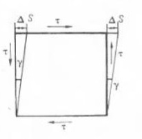 Սահք 1